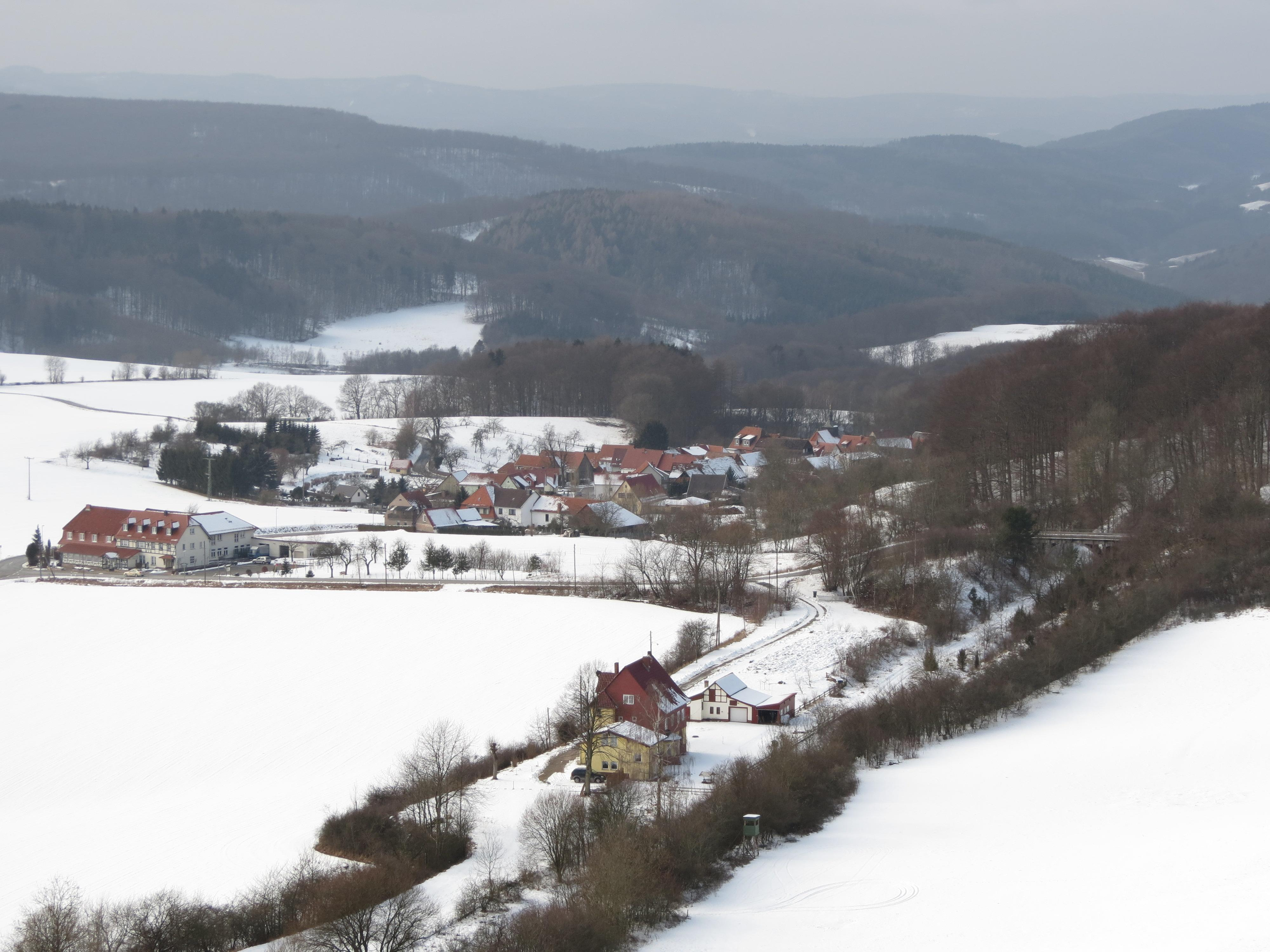 Blick von den Dieteröder Klippen auf Dieterode und Dieterode Bahnhof.